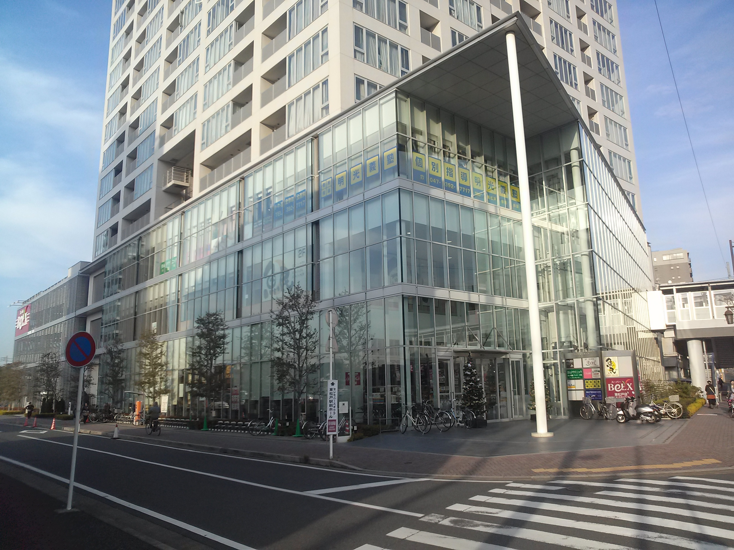 Belx Higashi-Matsudo, ベルクス東松戸店